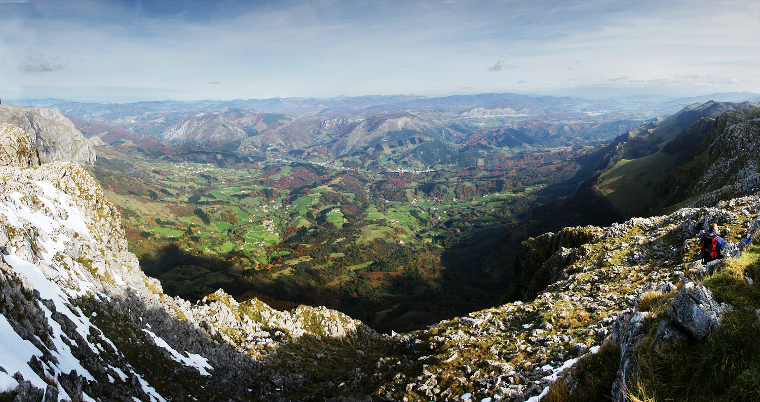 Nafarroako Araitz bailara